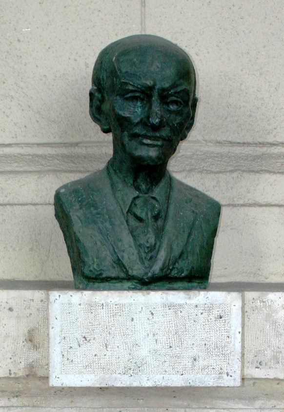 Sigmond Elek. Sculptor: Péter Kaubek